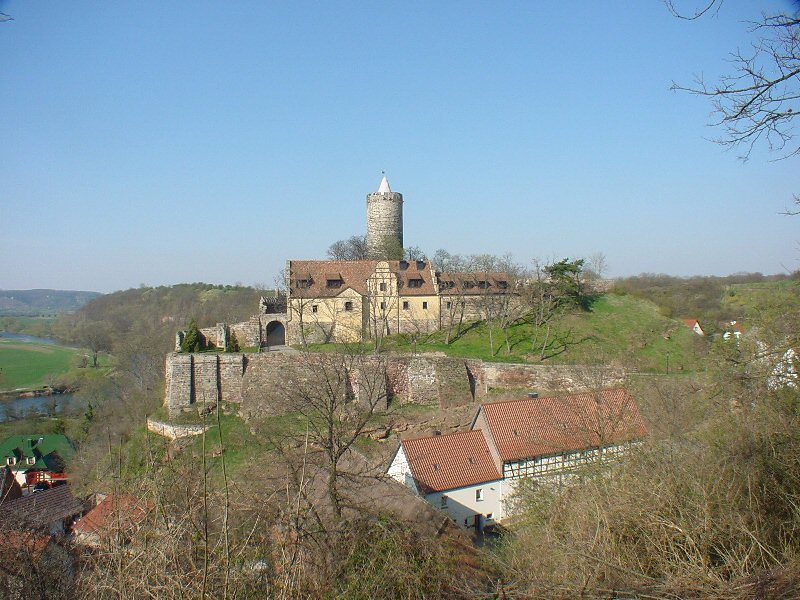 Schönburg